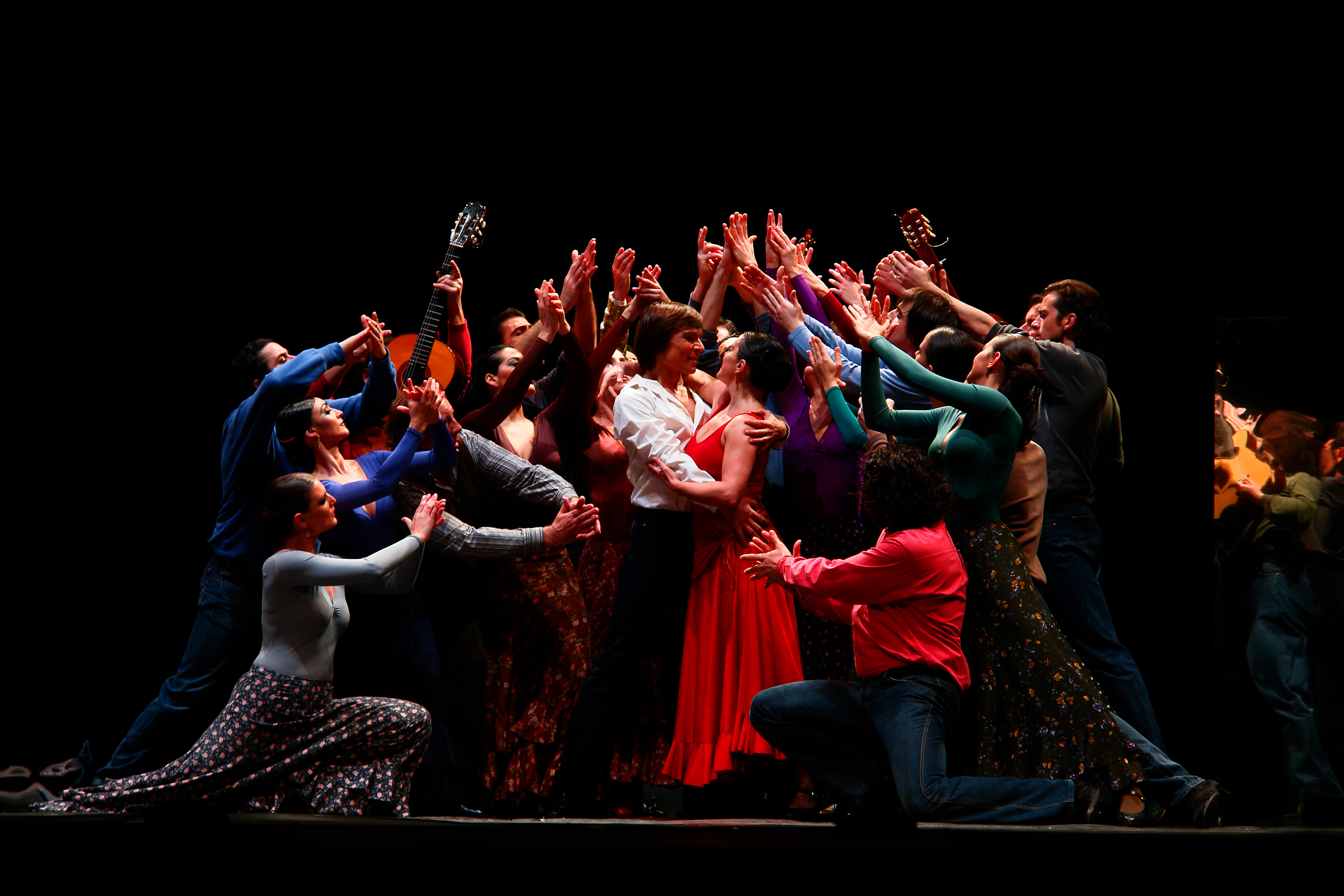 Carmen - Compagnie Antonio Gadès - Février 2008 - Centre international de Deauville